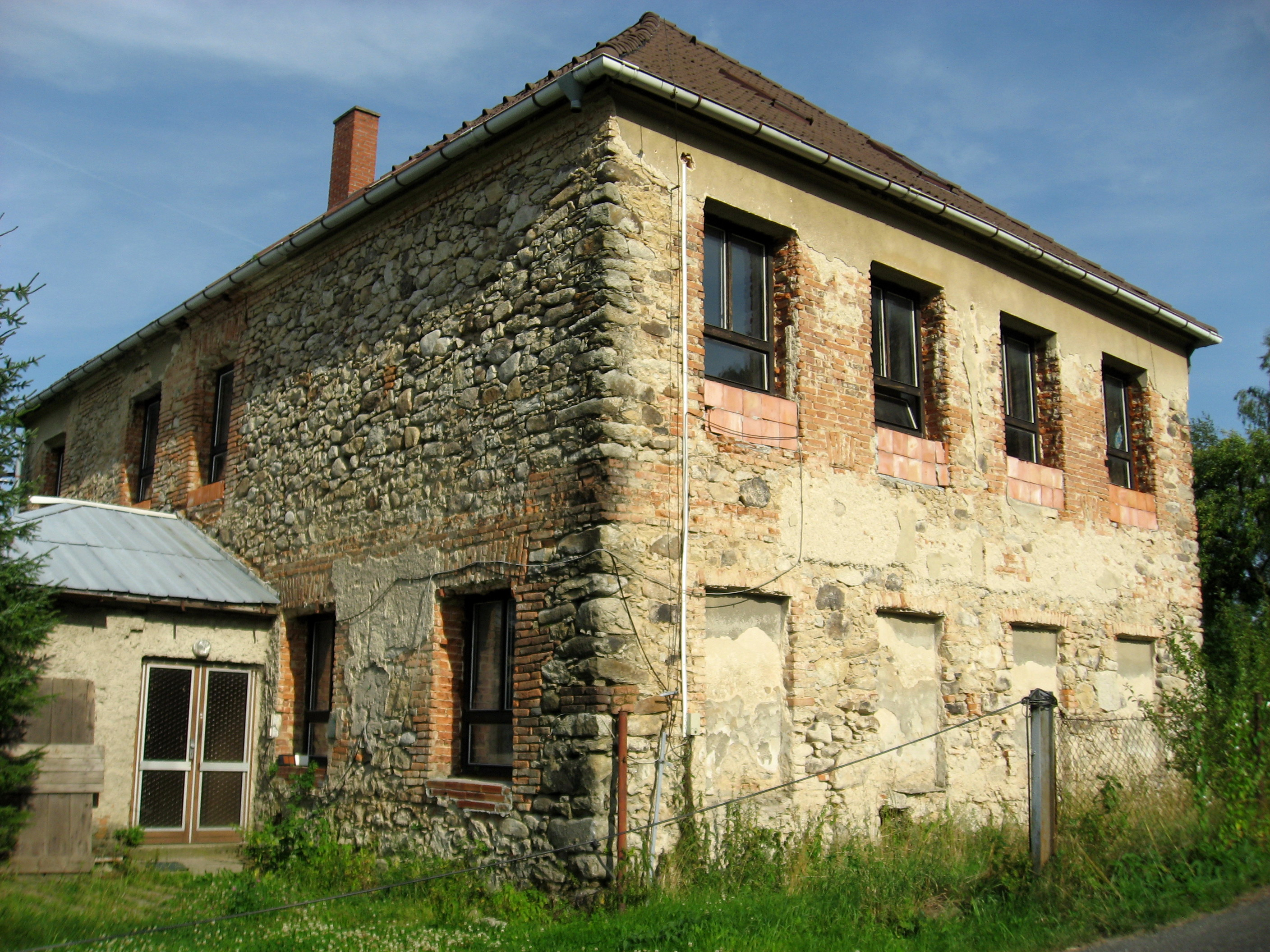 Trpišovice